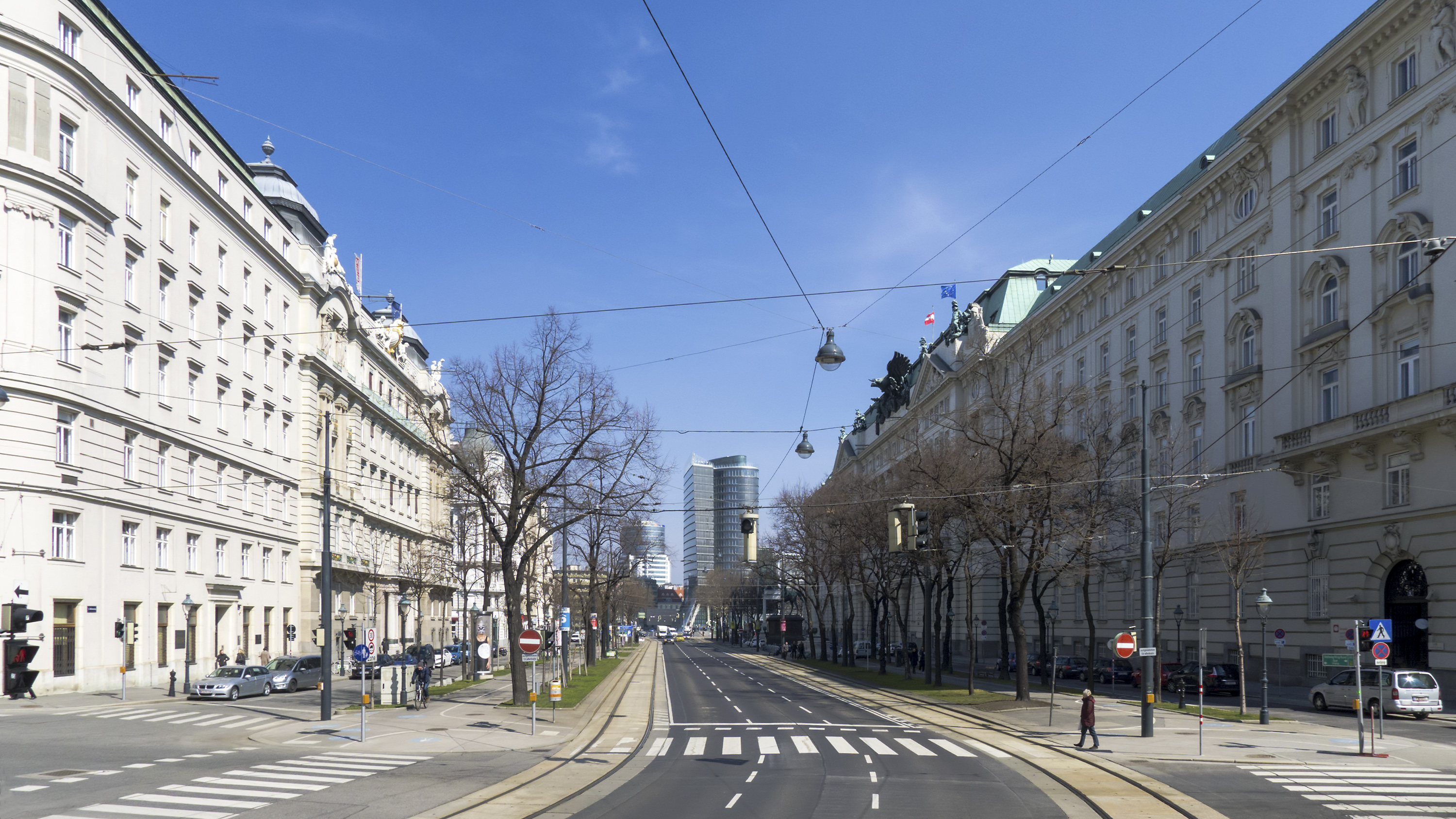 Stubenring bei der Rosenbursenstraße Richtung Norden